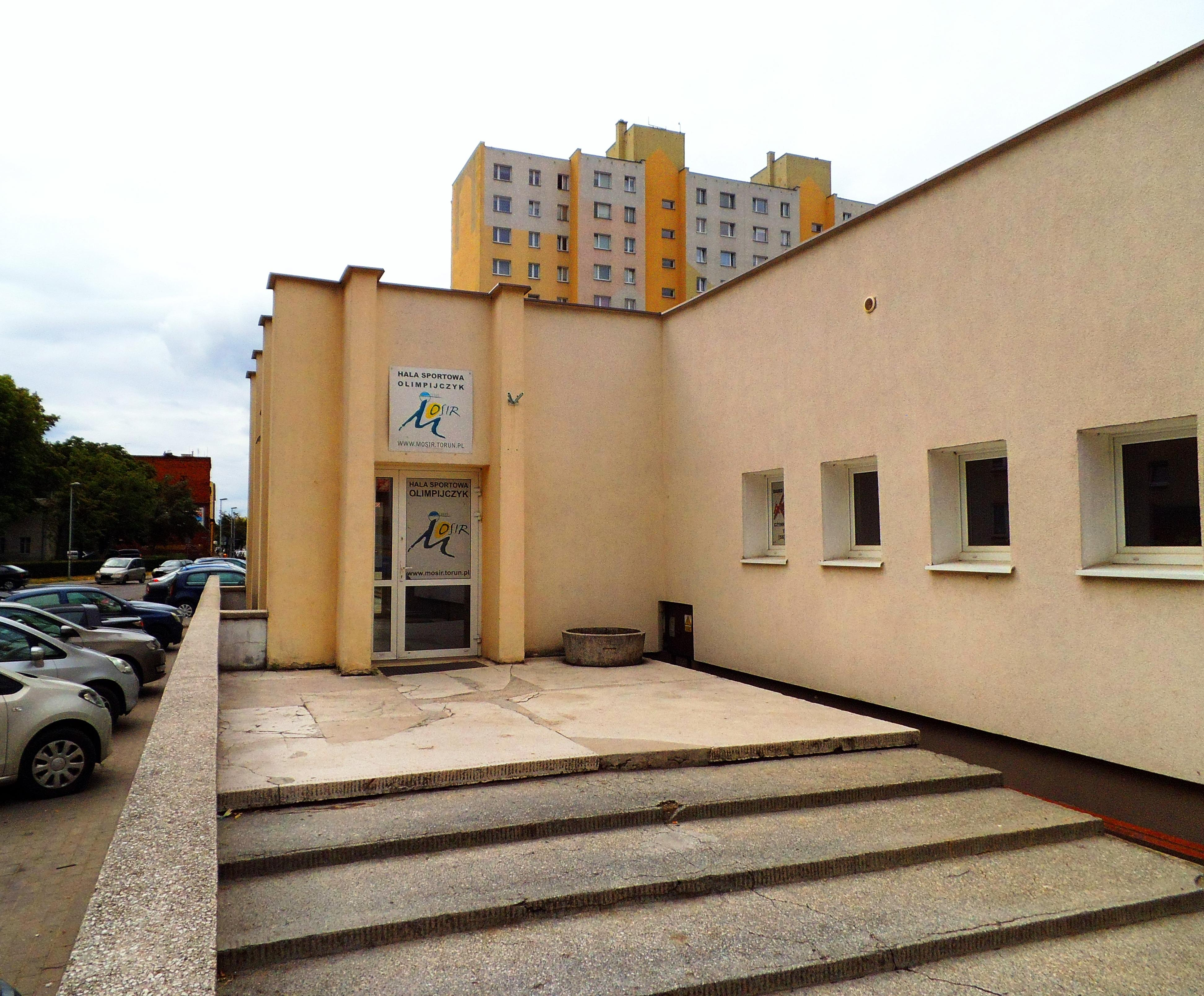 Hala Olimpijczyk w Toruniu1